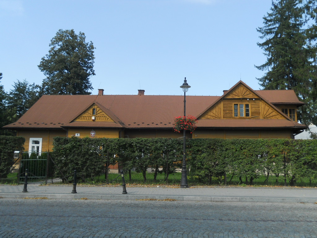 Stara plebania przy Starym Kościółku w Rabce-Zdroju przy ulicy Orkana 4.